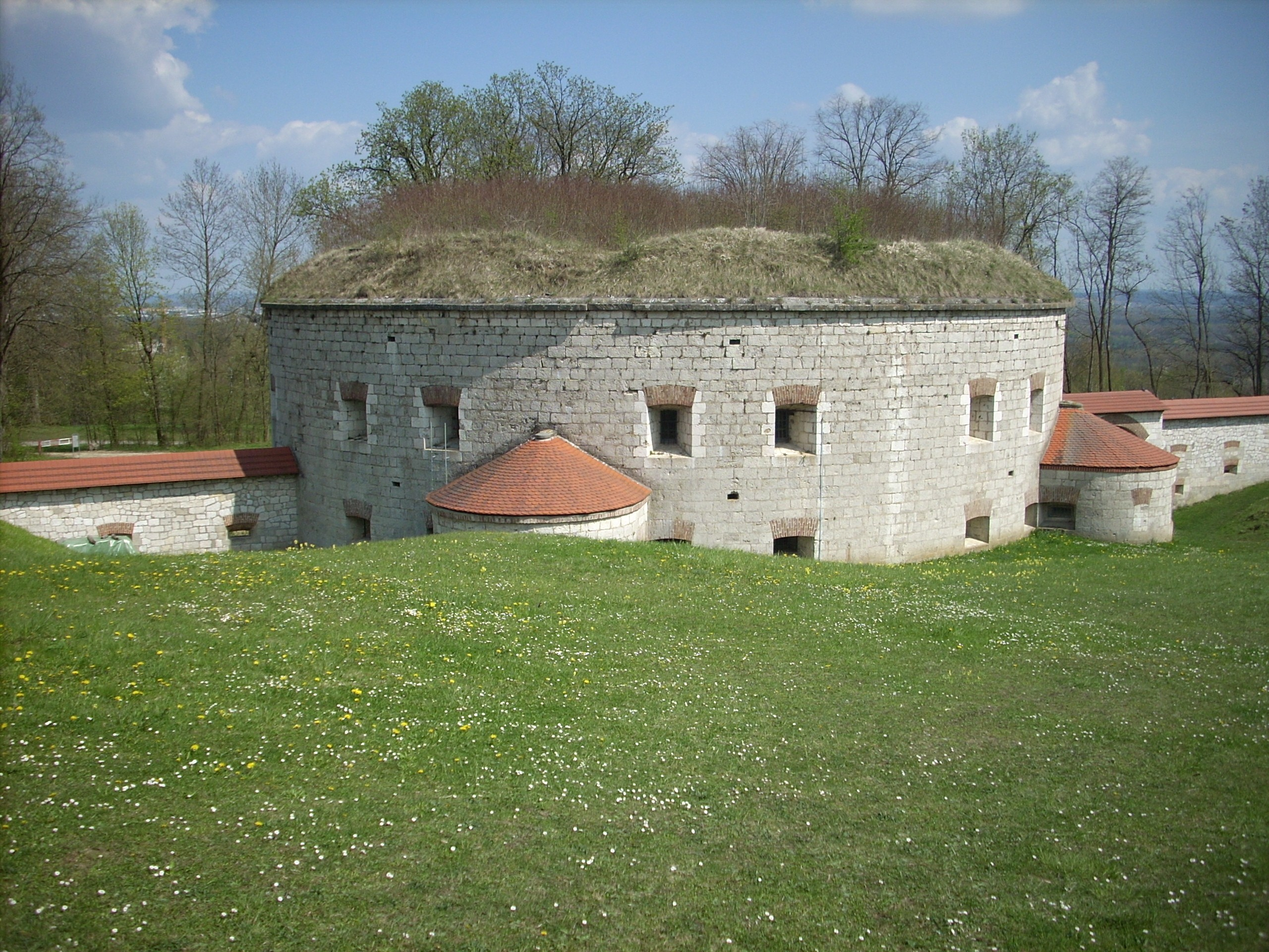 Fort Oberer Kuhberg (ehemaliges KZ) bei Ulm